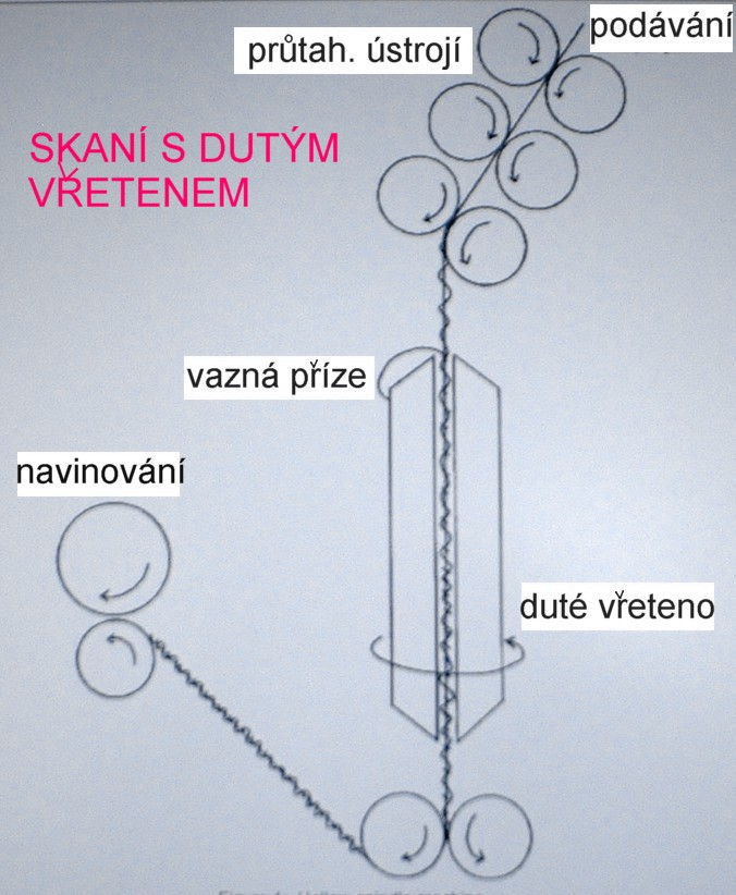 Schema: Zwirnen mit Hohlspindel